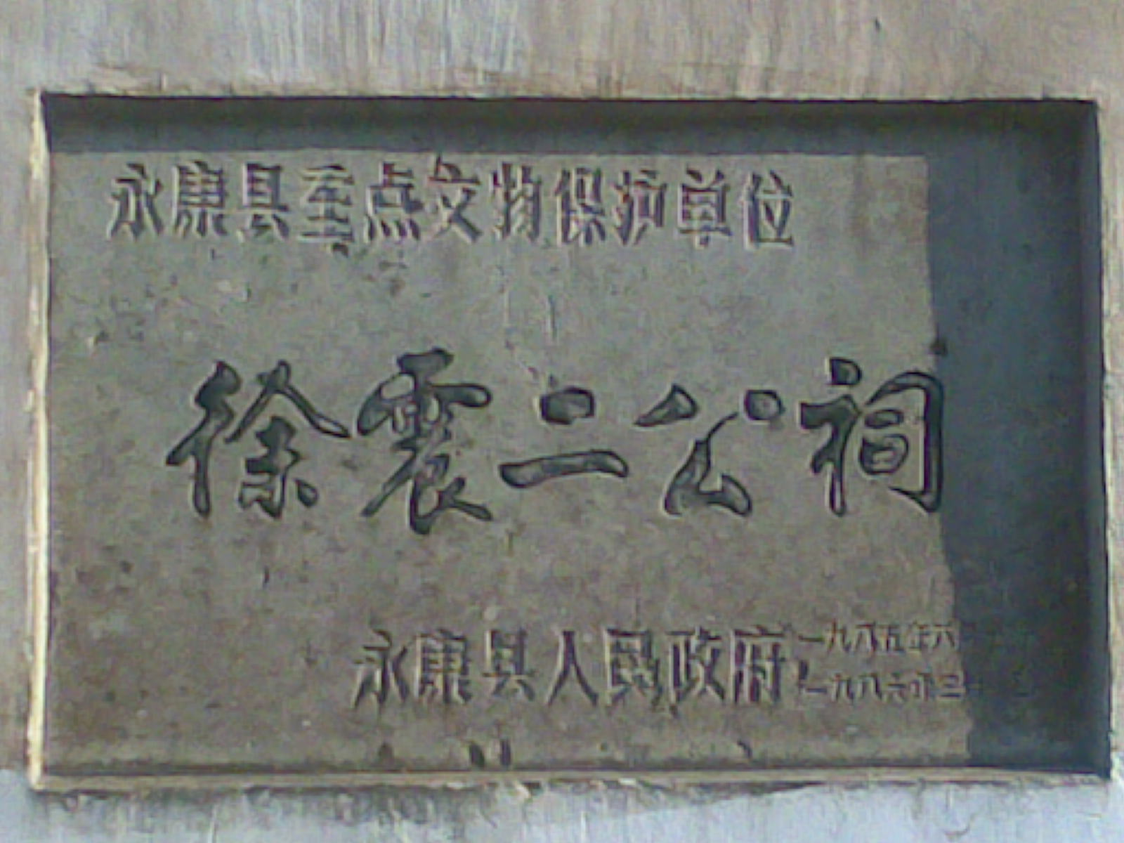 徐震二公祠碑